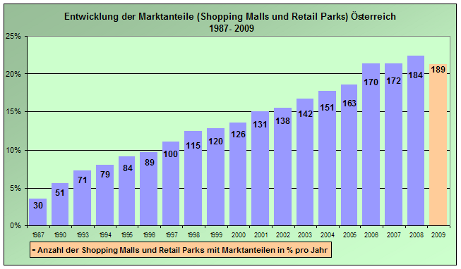 Graphik über den Marktanteil von Einkaufszentren in Österreich